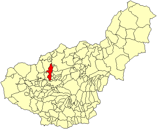 Situación del término municipal de Albolote respecto a la provincia de Granada, en España.